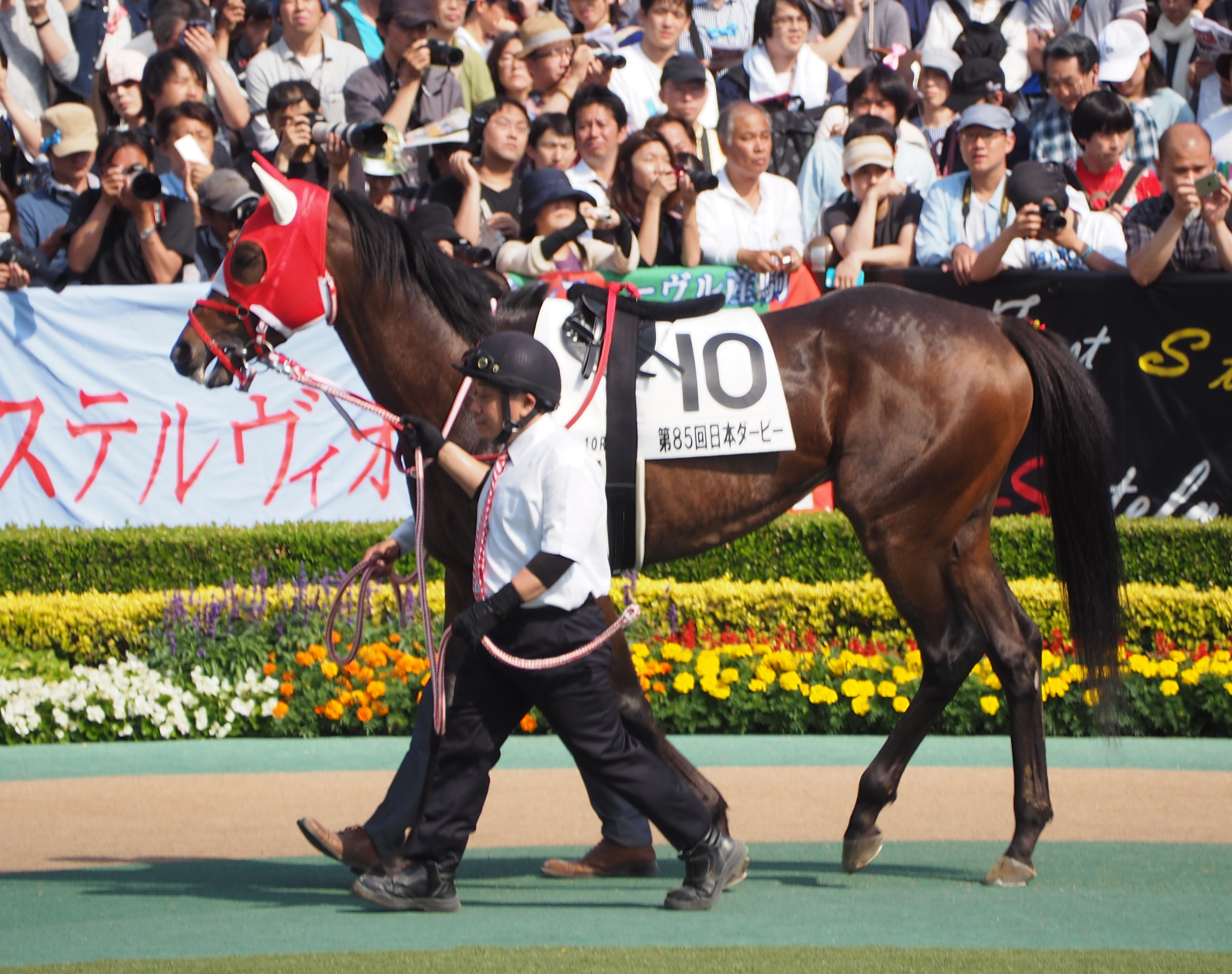 10R 東京優駿 日本ダービー